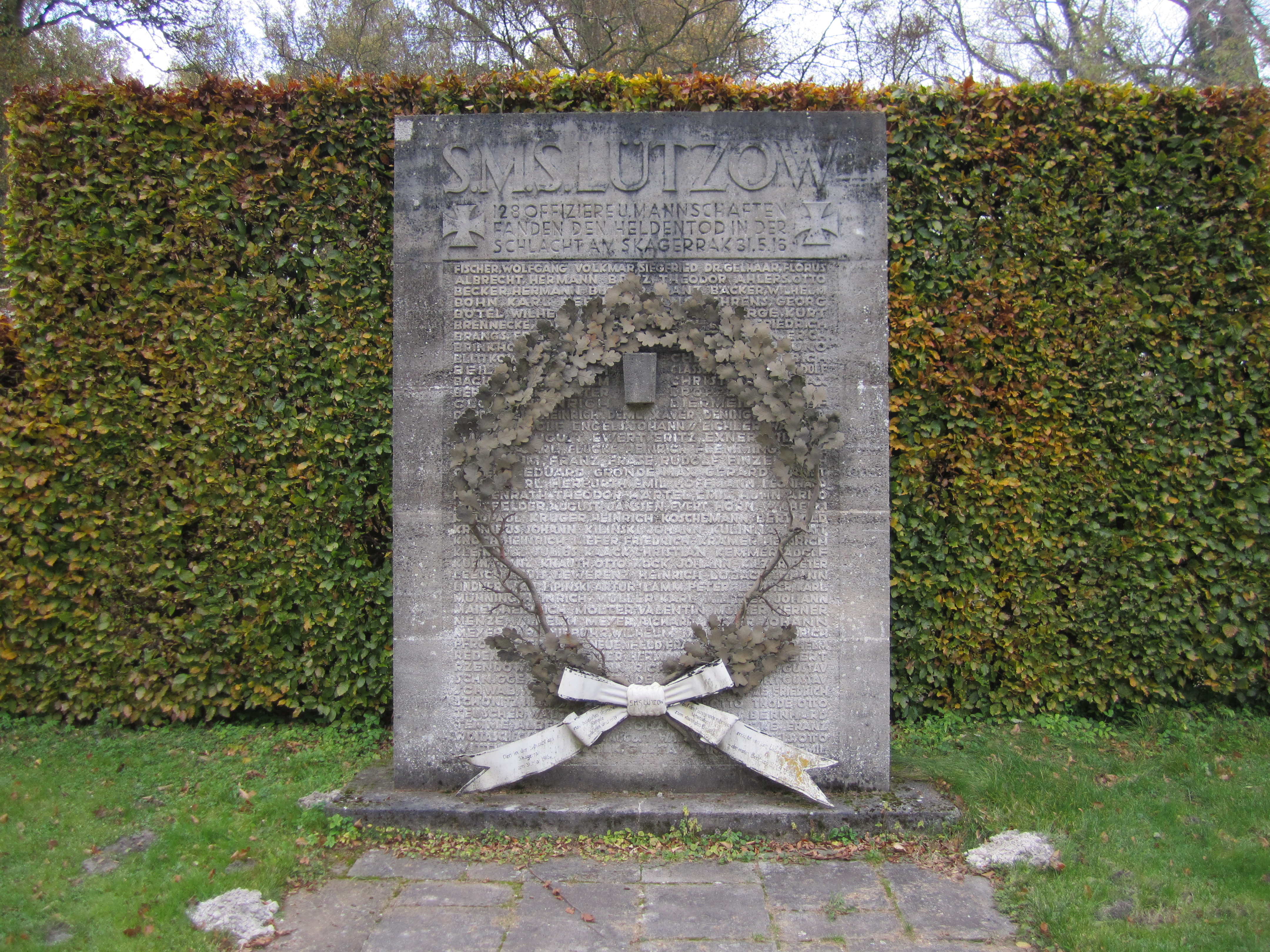 Gedenkstein für die Toten des SMS Lützow